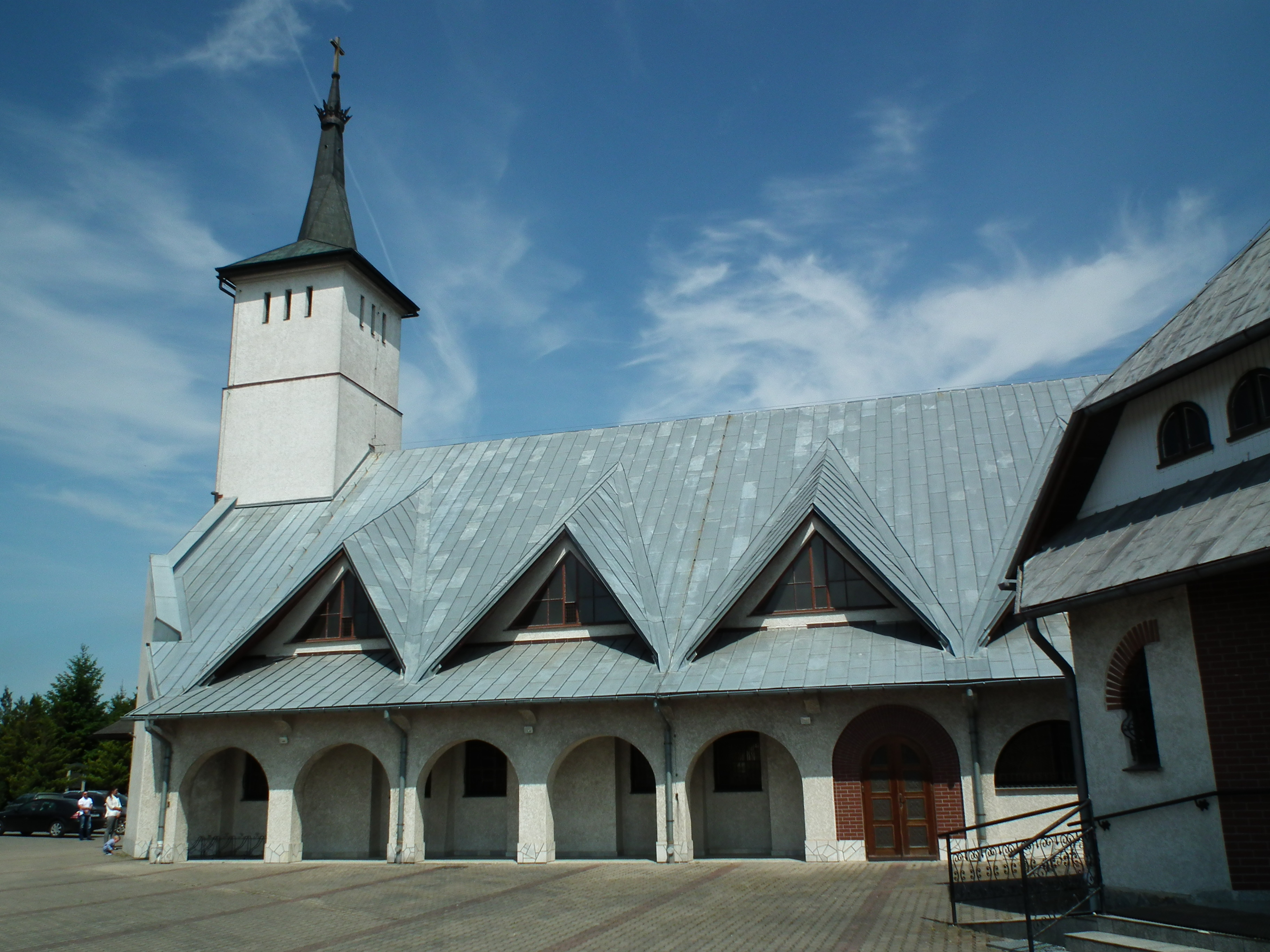 Kościół NMP Królowej w Oławie (dawniej Domańskiego).